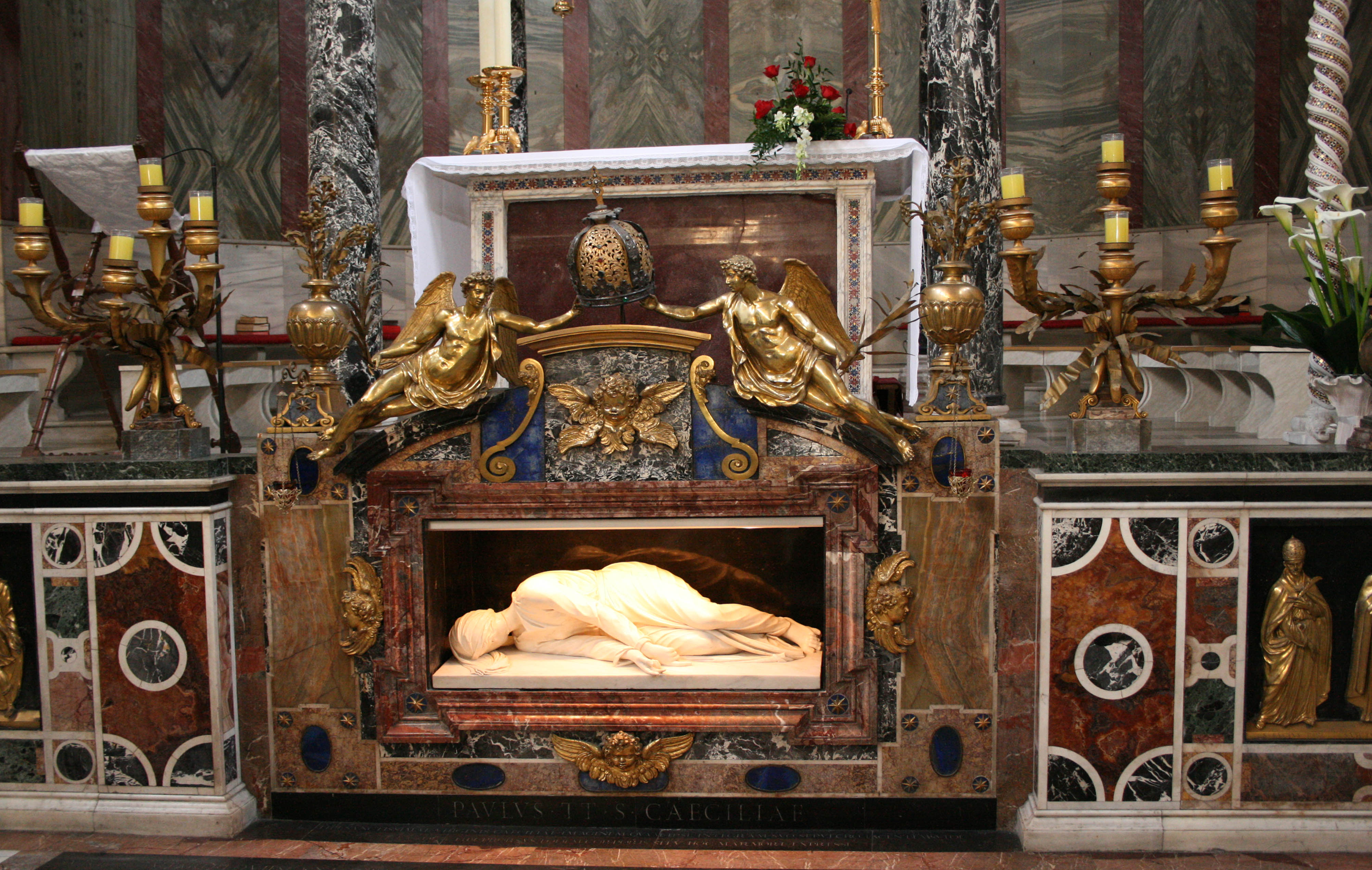 Statue Santa Cecilia by Stefano Maderno, Trastevere